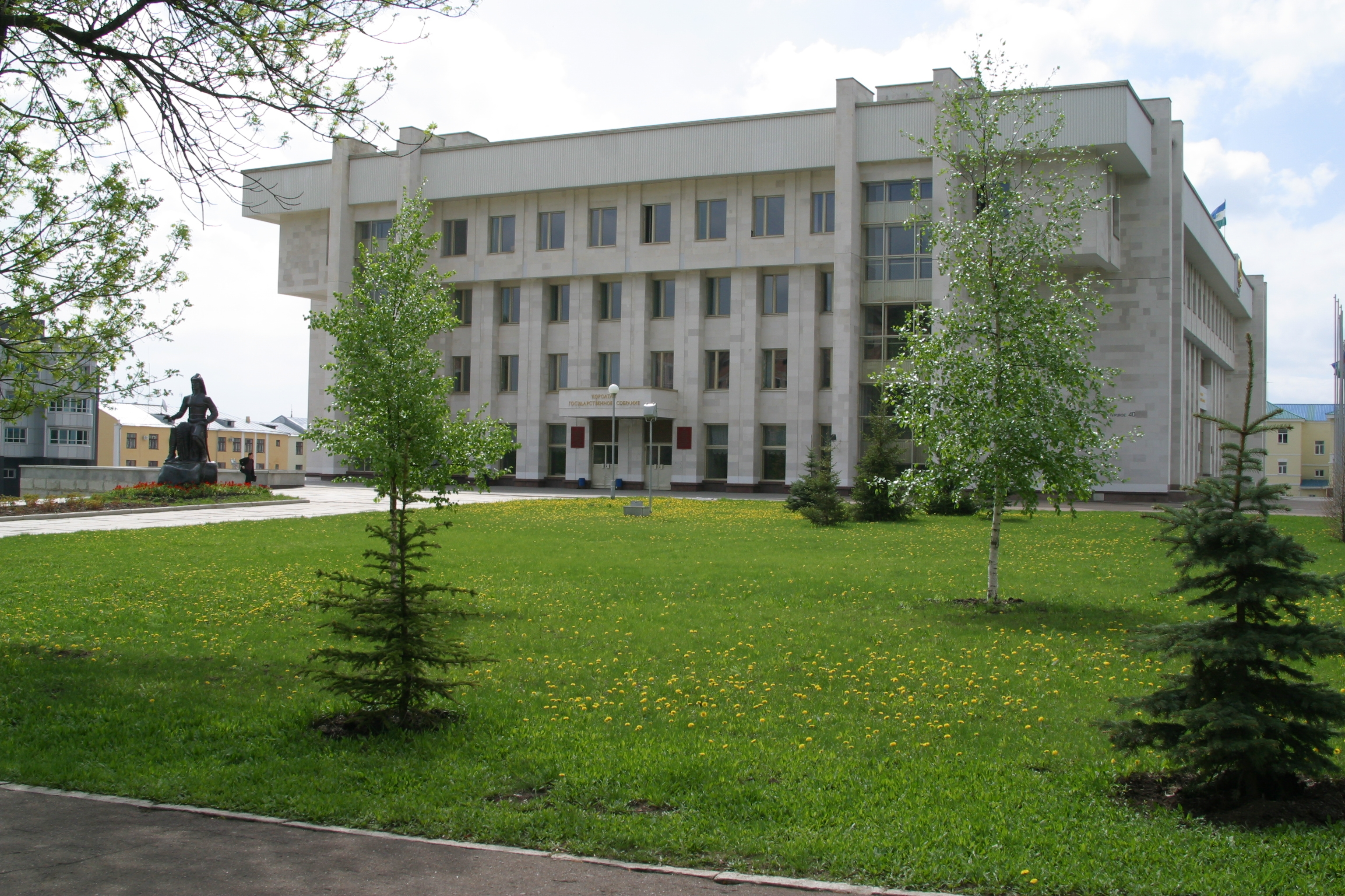 главный корпус